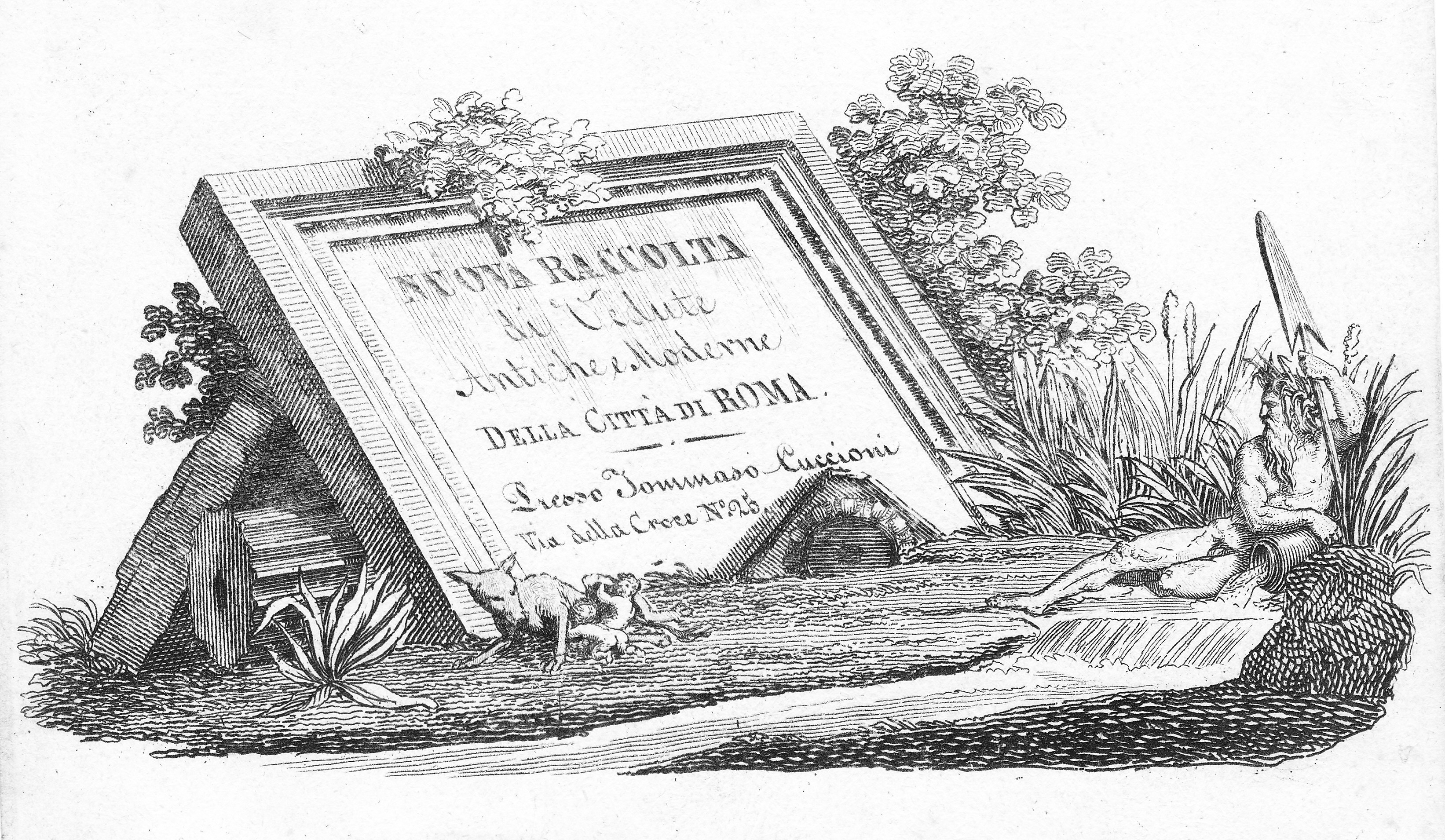 Titelblatt zu den "Nuova Raccolta di Vedute Antiche e Moderne della Citta di Roma.